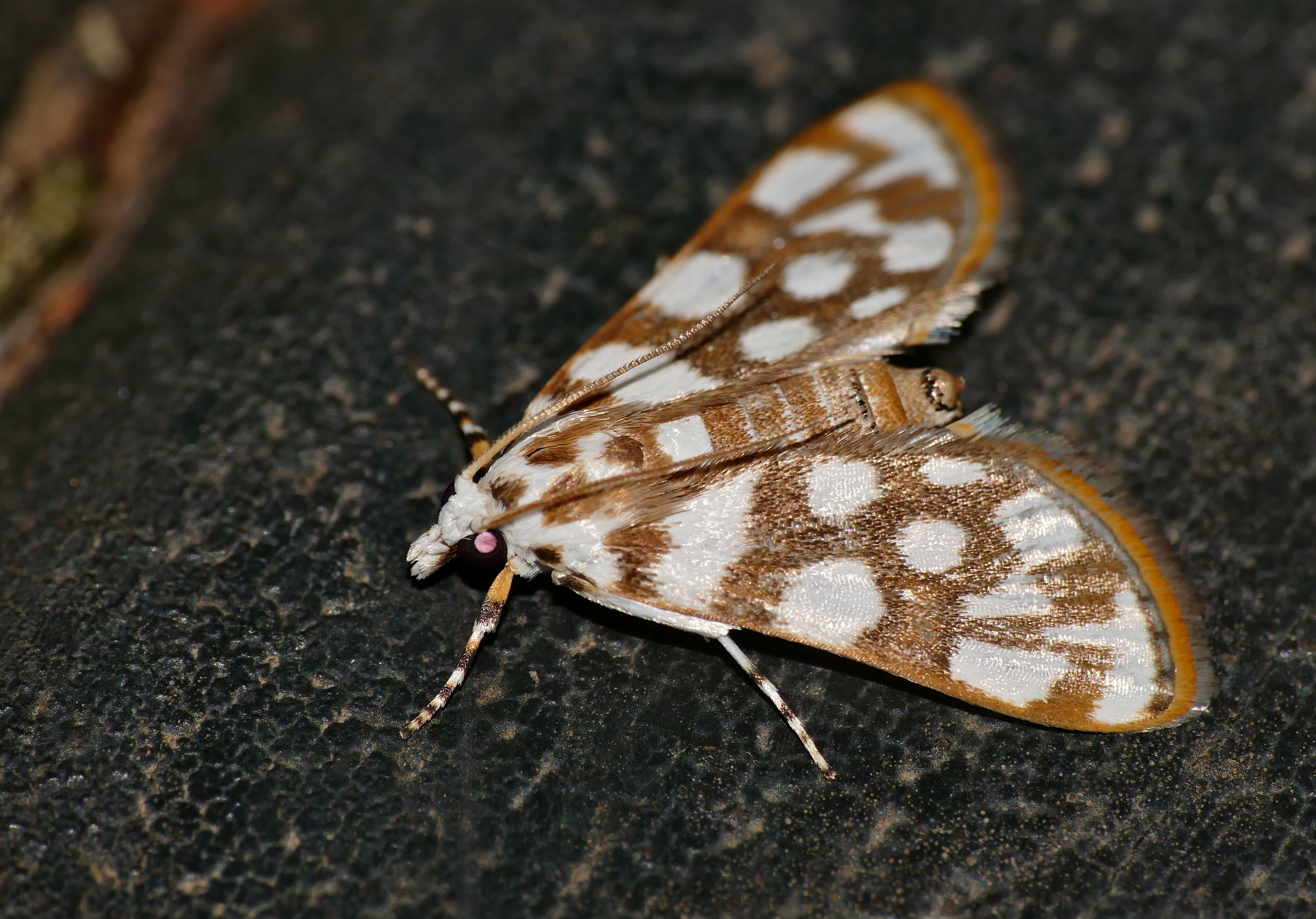 Hilltop Camp, Hluhluwe Game Reserve, Hluhluwe-iMfolozi Park, Kwazulu-Natal, SOUTH AFRICA